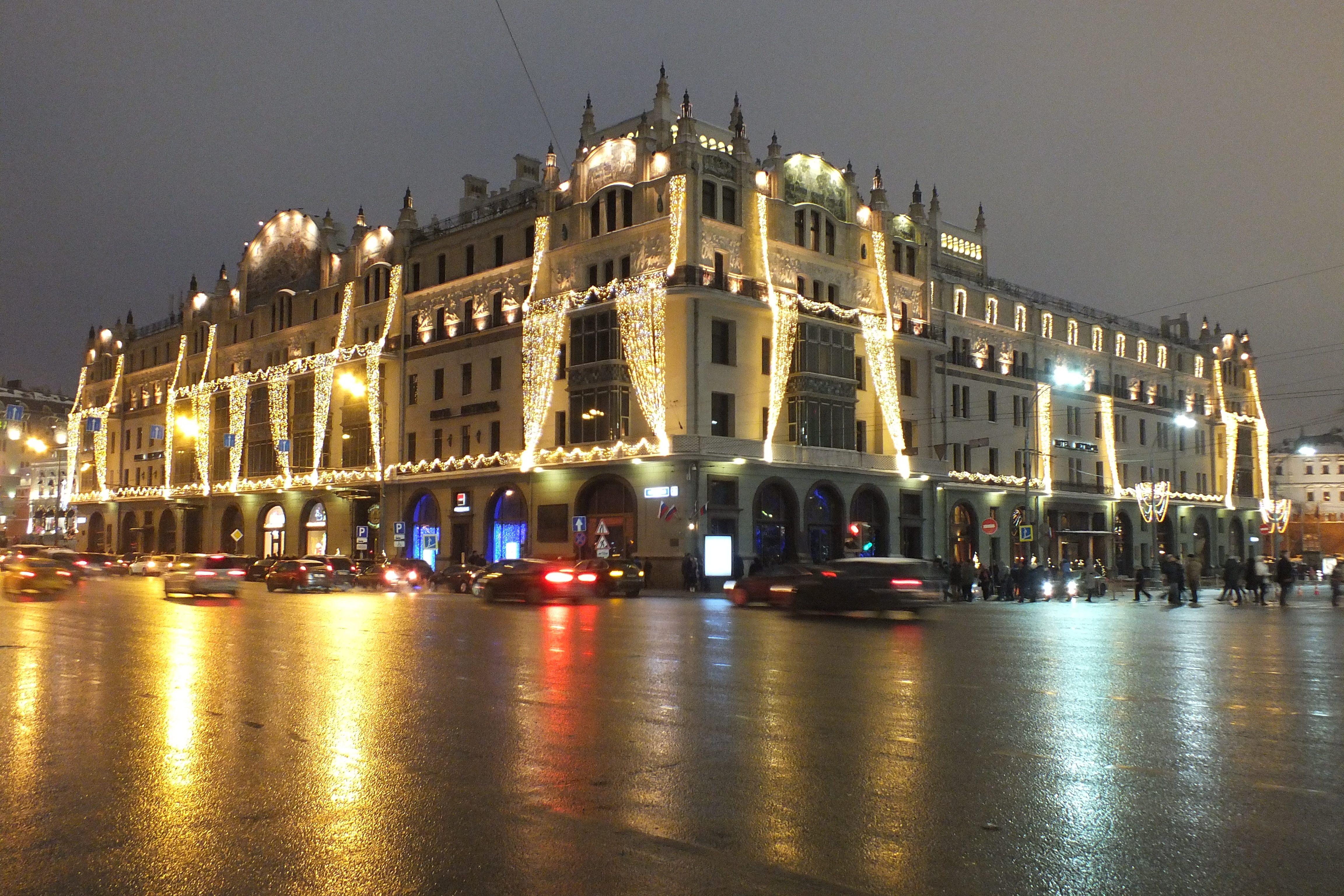 Вид на гостиницу «Метрополь» ночью. Снято 1 января 2015 года с пересечения Театрального проезда и улицы Петровка.